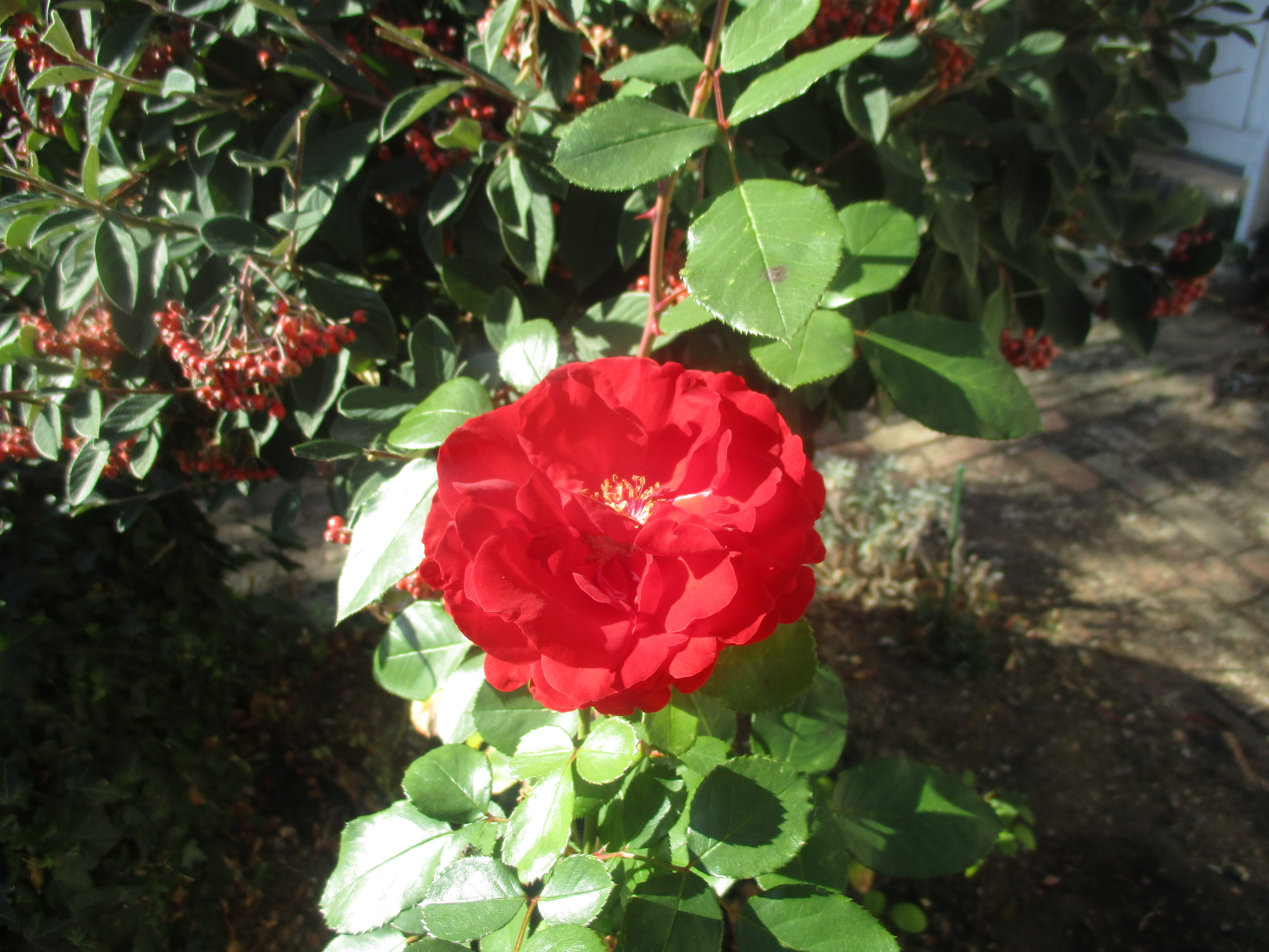 Rosier floribunda 'Fluorescent' (Delbard) rouge vermillon (1977). Photographie prise en France.